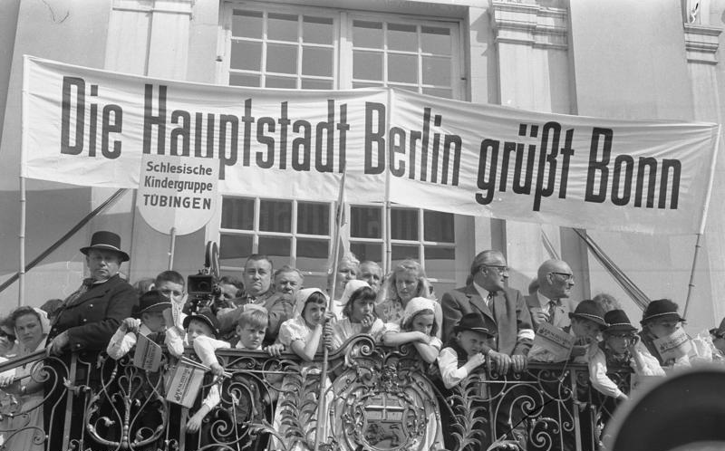 Kundgebung der Vertriebenen und Flüchtlinge am Markt (in Bonn) Information added by Wikimedia users.